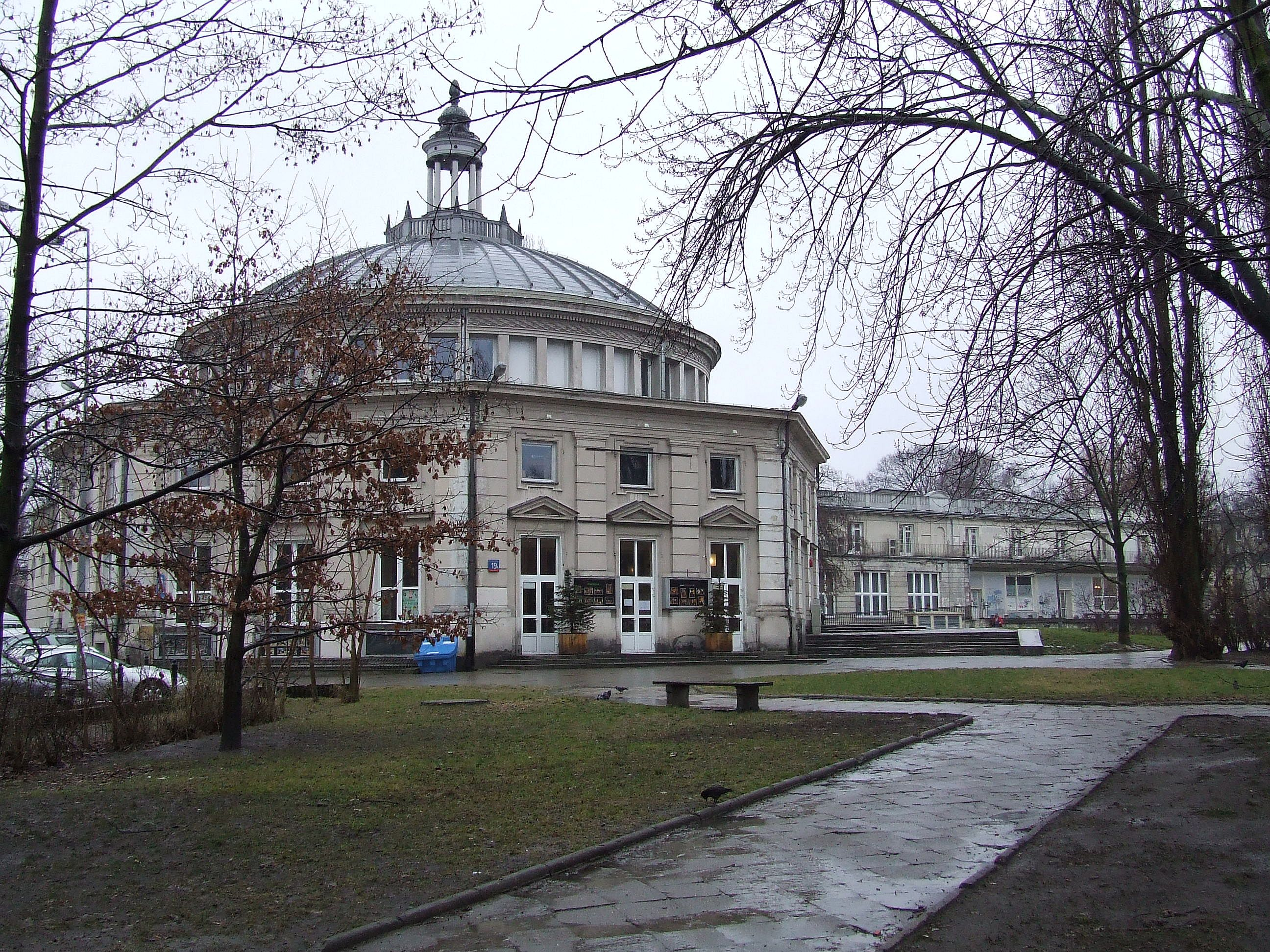 Teatr Komedia, Warszawa Żoliborz